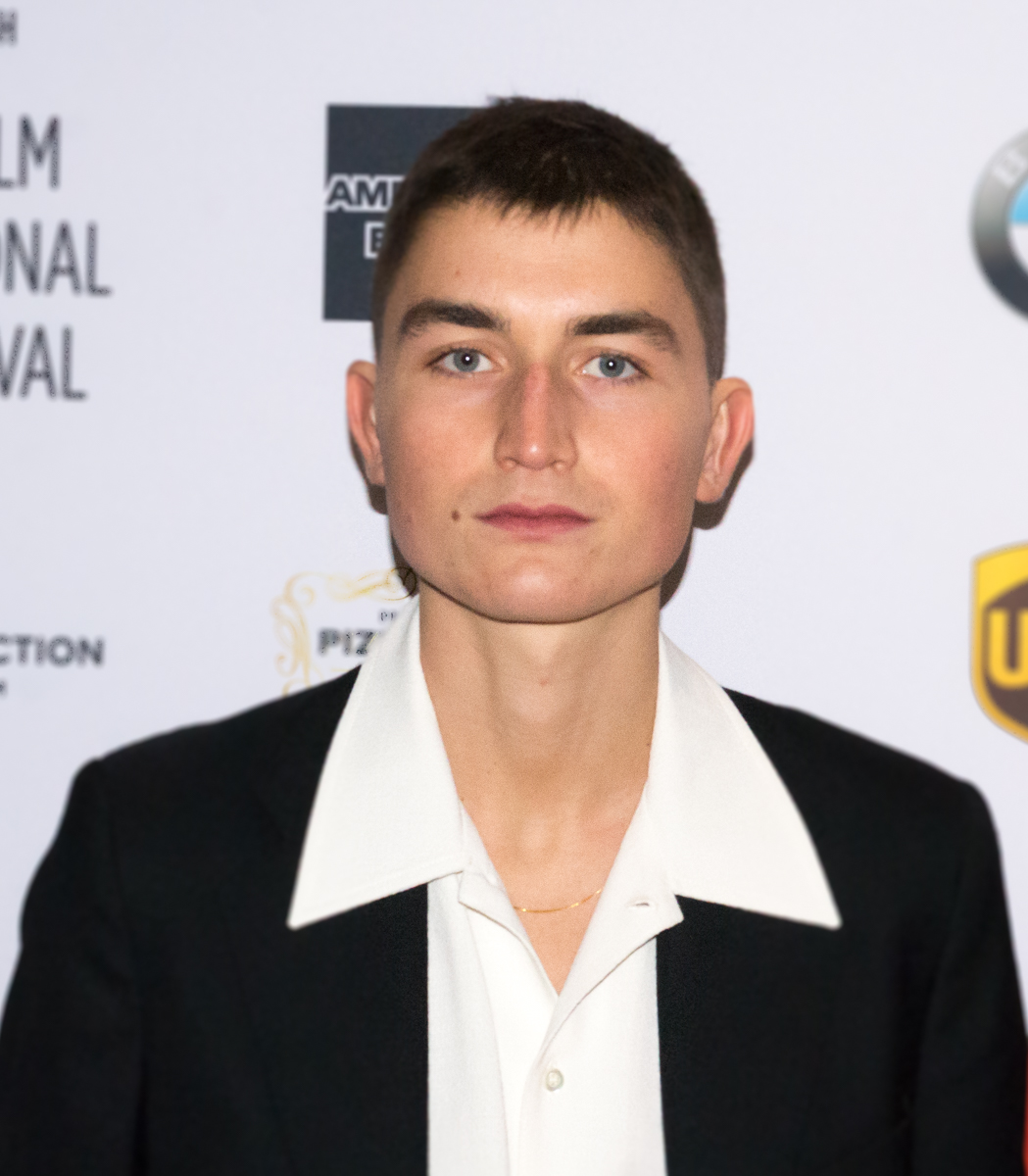 Gustav Lindh inför prisutdelningen på Stockholms internationella filmfestival den 16 november 2018.